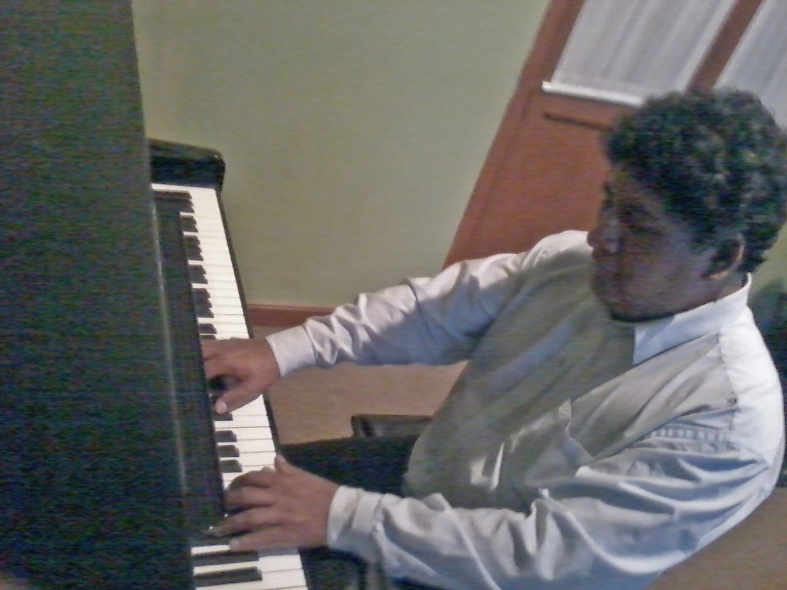 Profesor Lorgio Lucía